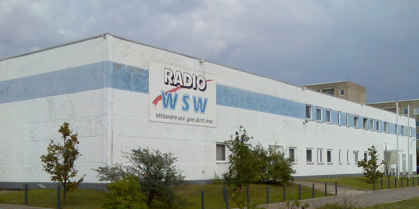 Radio WSW - Stadtsender